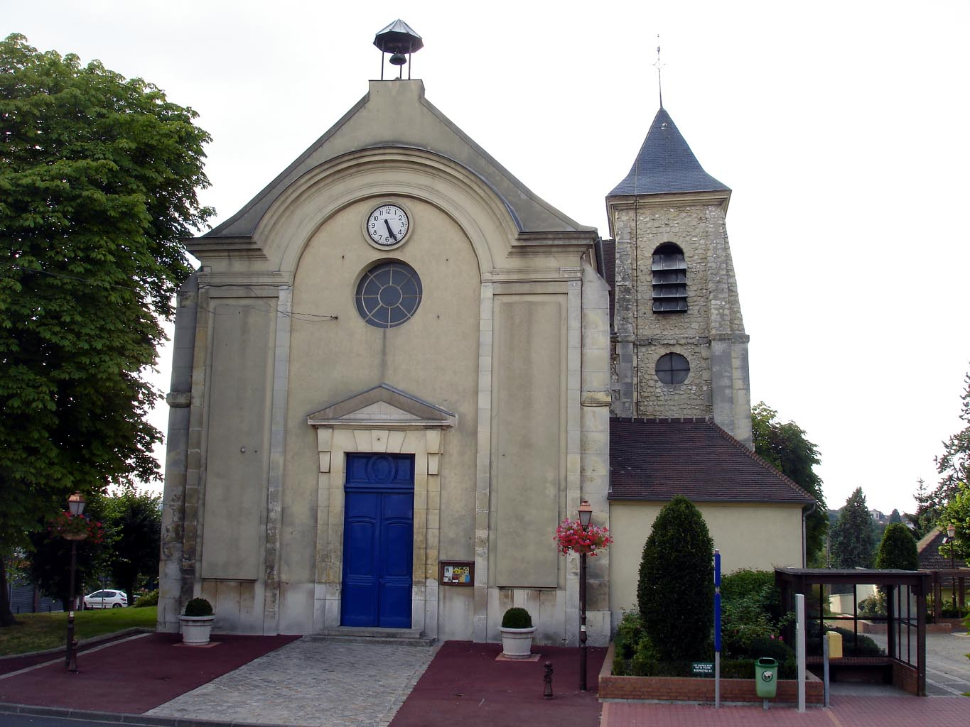 Façade de l'église Saint-Martin à Bonneuil-en-France (Val-d'Oise), France